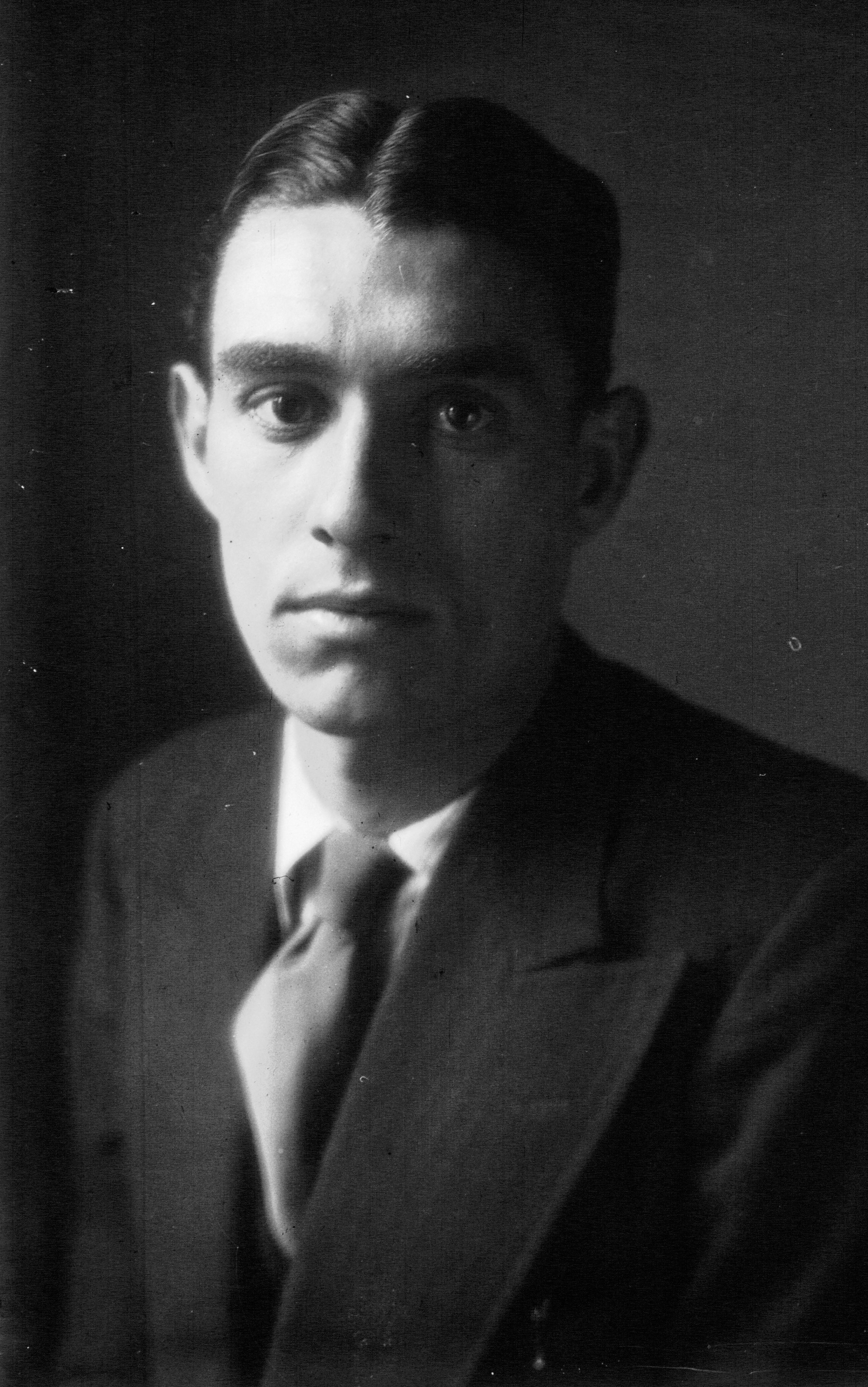 Jules Ladoumègue en 1930